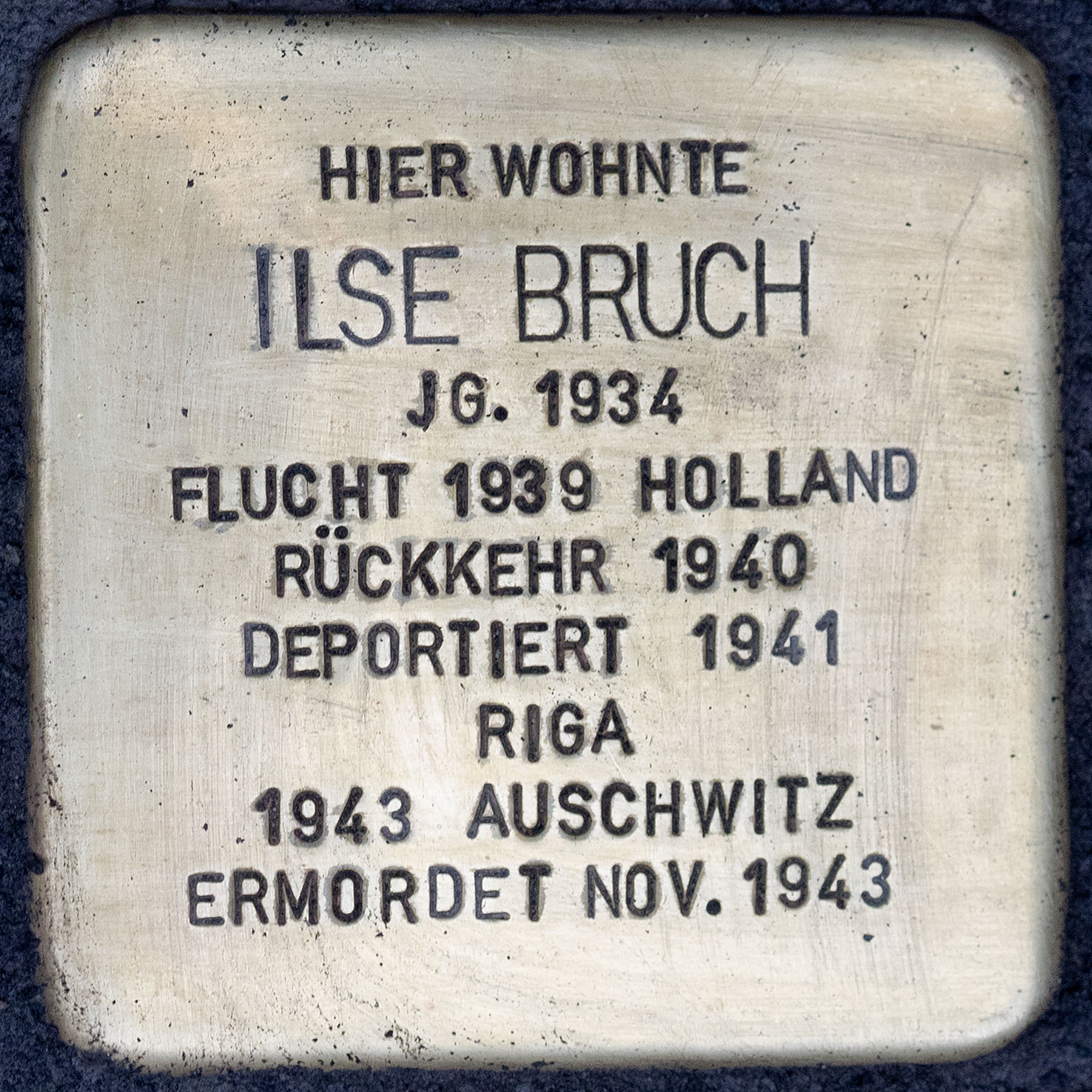 Stolpersteine Kempen: Ilse Bruch